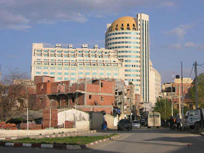 Centre d'Affaire Al Qods de Cheraga